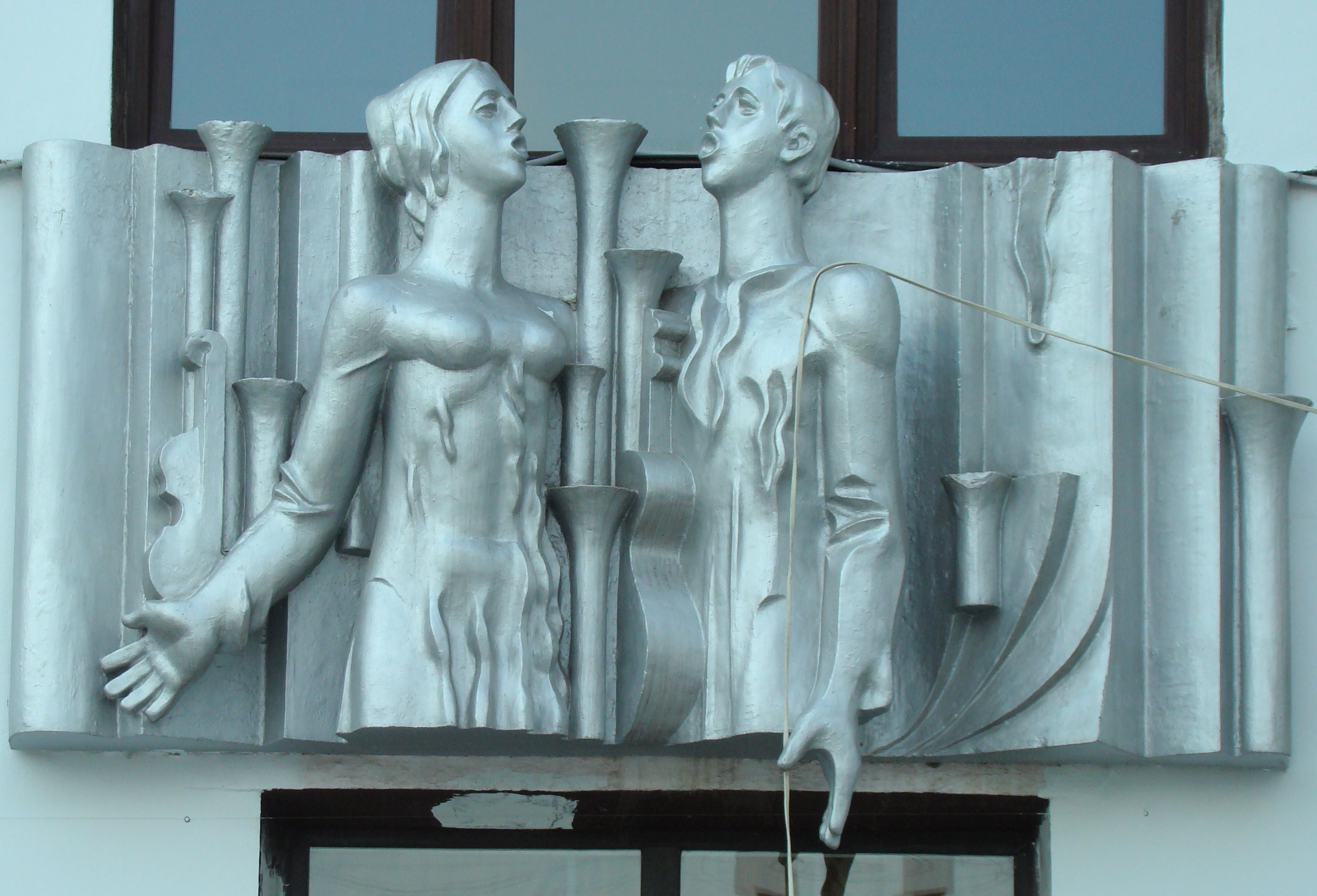 Горельеф «Театр». ДК ЦГОК, г. Кривой Рог, 1985 г.